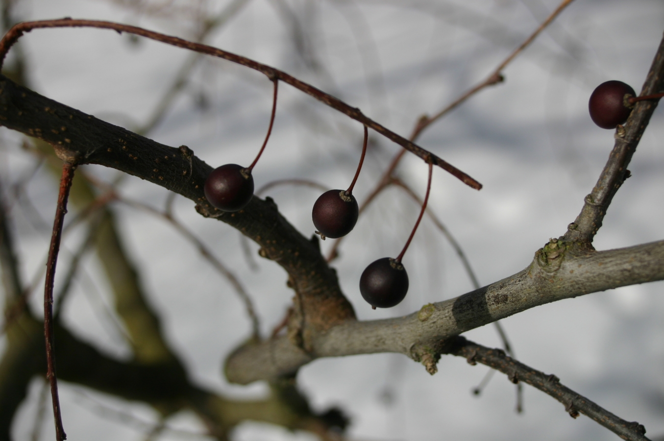 Celtis occidentalis: Fruit.